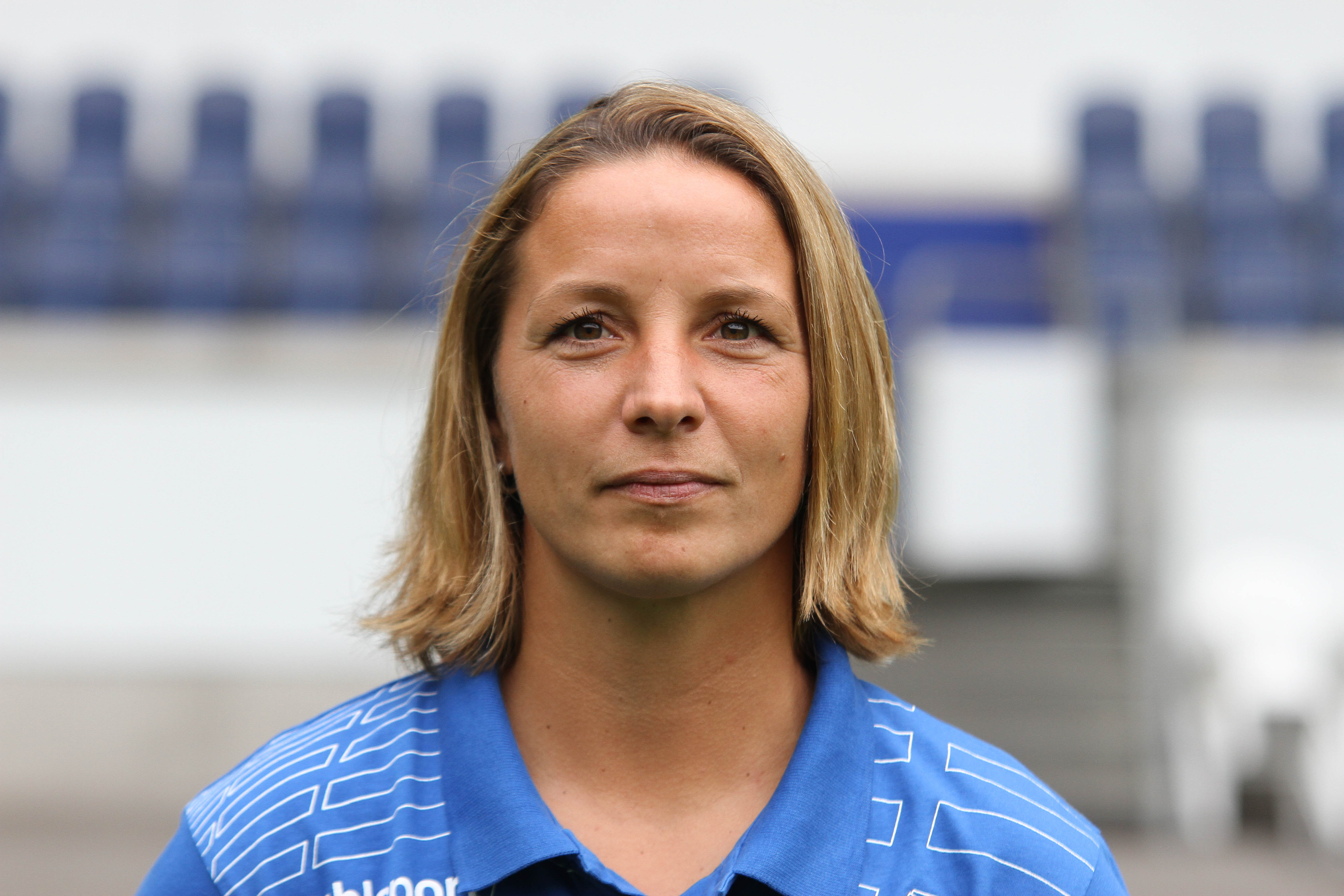 Inka Grings (2014)